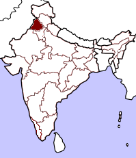 Kartan bygger på resultatet från valet till Lok Sabha april/maj 2004. Gult betyder att partiet lanserat en eller flera kandidater i delstaten, dock utan att vinna mandat. Orange betyder att partiet vunnit mandat från delstaten. Rött betyder att partiet vunnit minst 25% av mandaten från den delstaten och mörkrött 50% eller mer. Kartan tar inte hänsyn till avhopp, partifusioner och fyllnadsval under den ordinarie mandatperiodens gång.